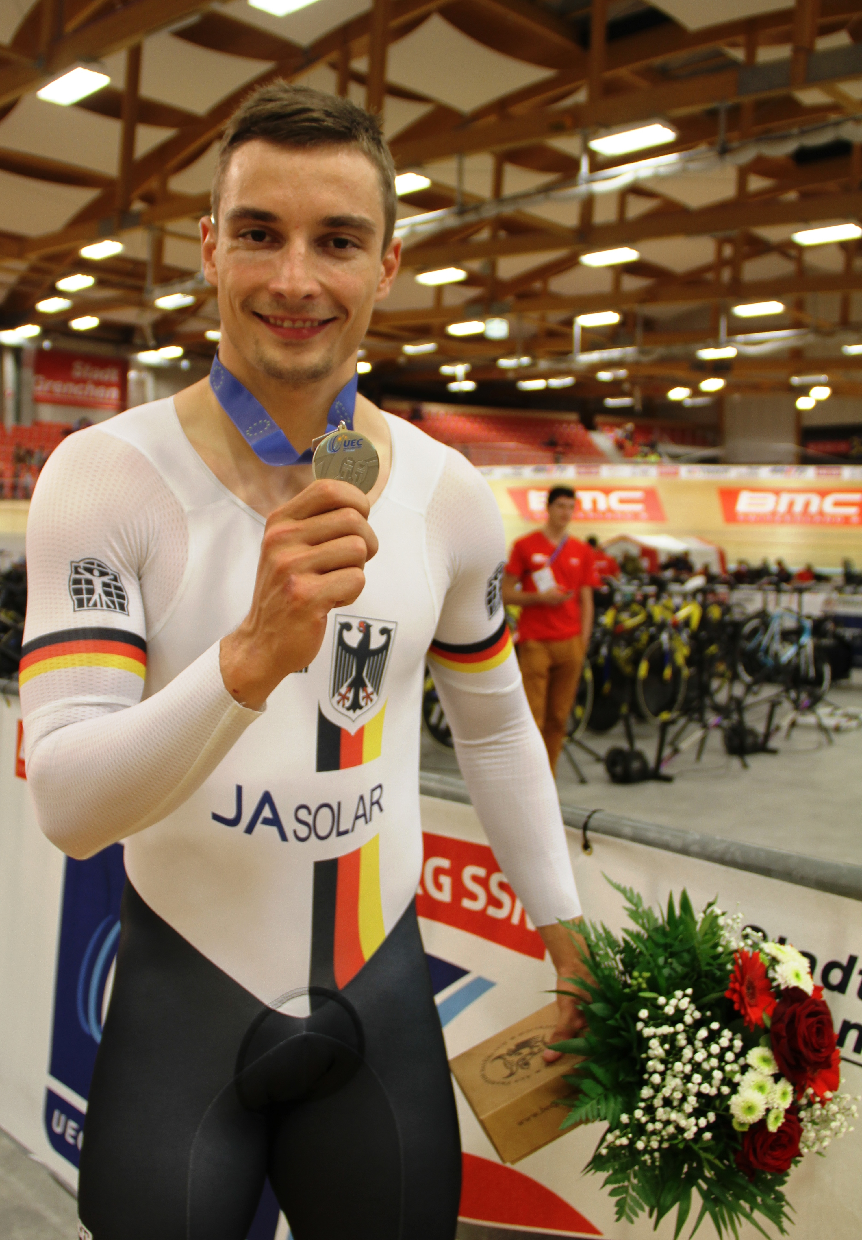 Max Niederlag, deutscher Radsportler, Silber im Sprint The making of this document was supported by the Community-Budget of Wikimedia Germany.